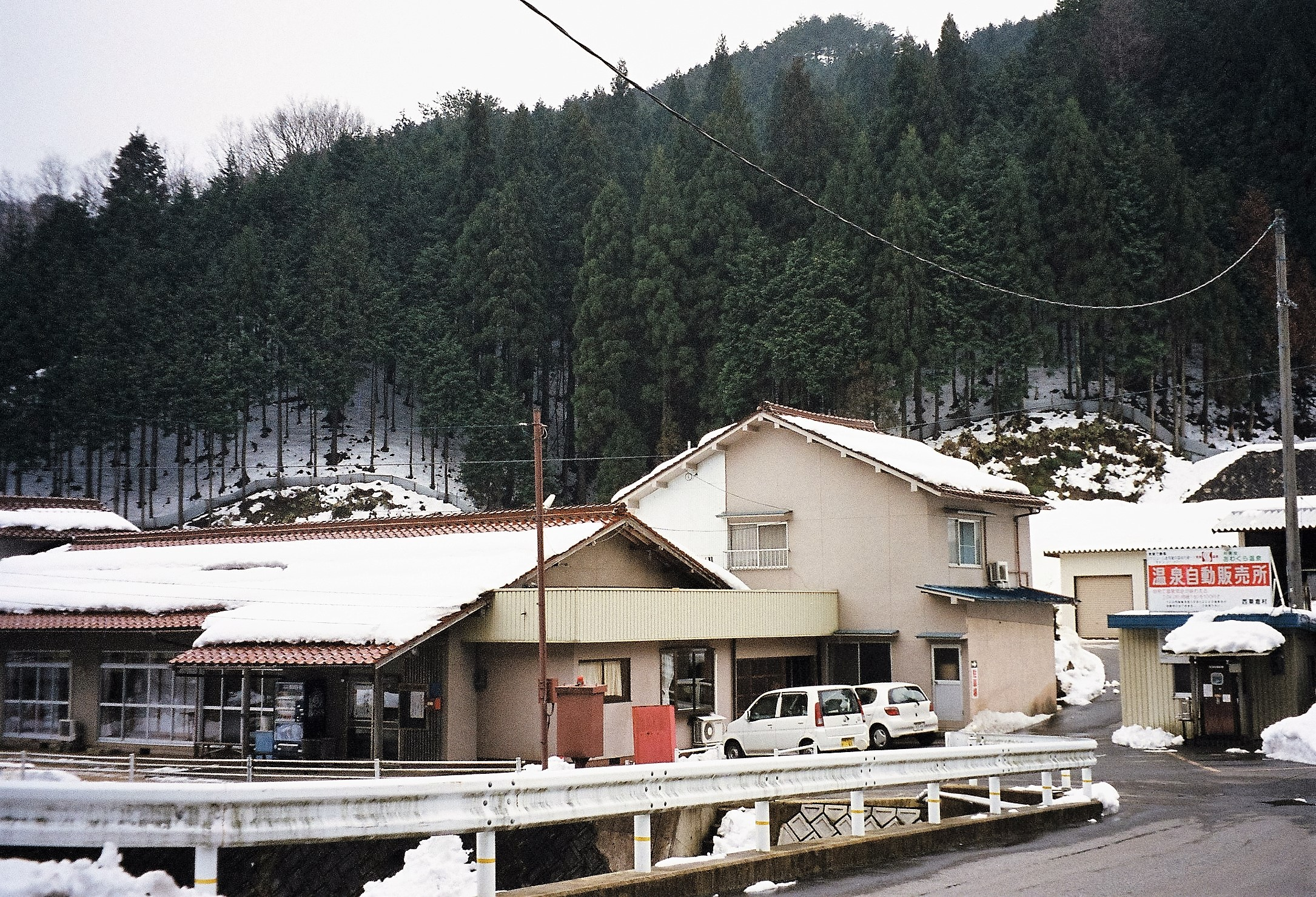 あわくら温泉元湯（2004年当時、2011年休業前の建物）